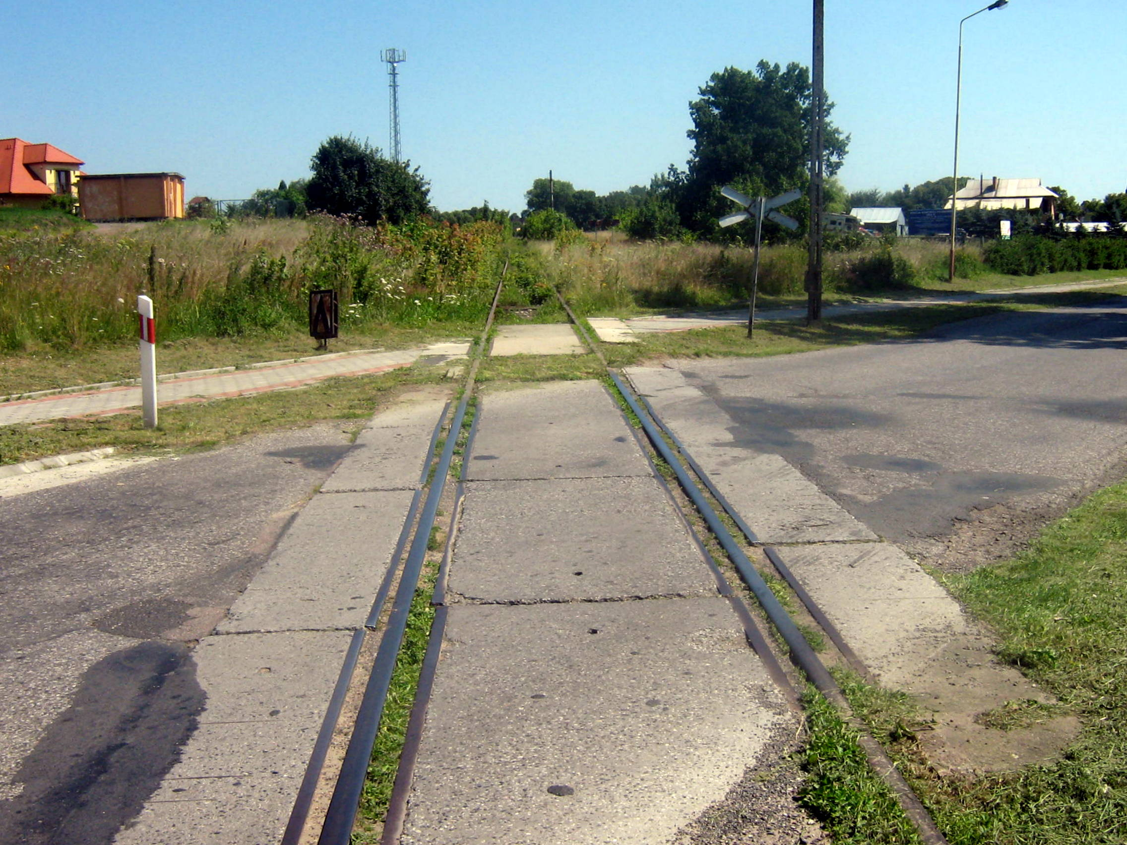 Linia kolejowa nr 420 w Golczewie.